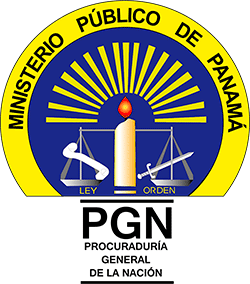 Logo del Ministerio Público de Panamá